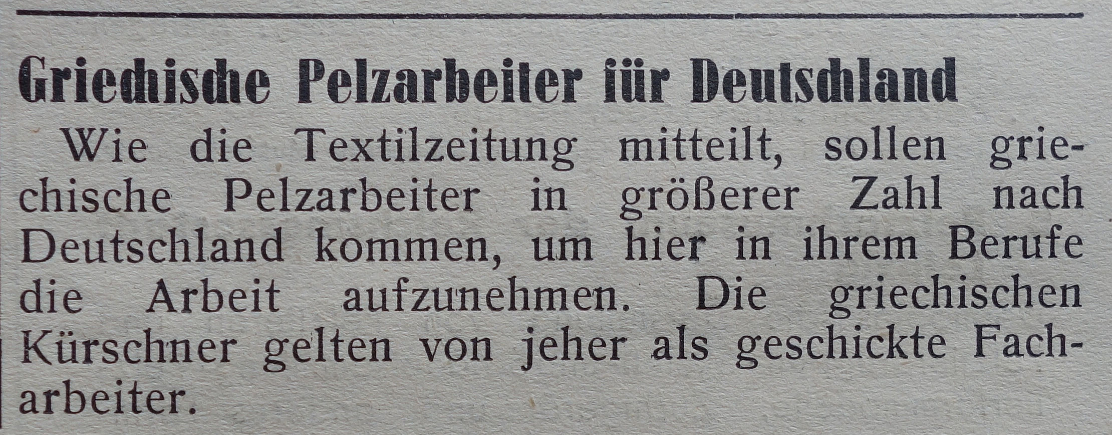 Griechische Pelzarbeiter für Deutschland. 20. November 1942.